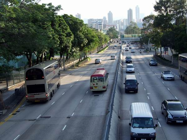 九龍塘窩打老道